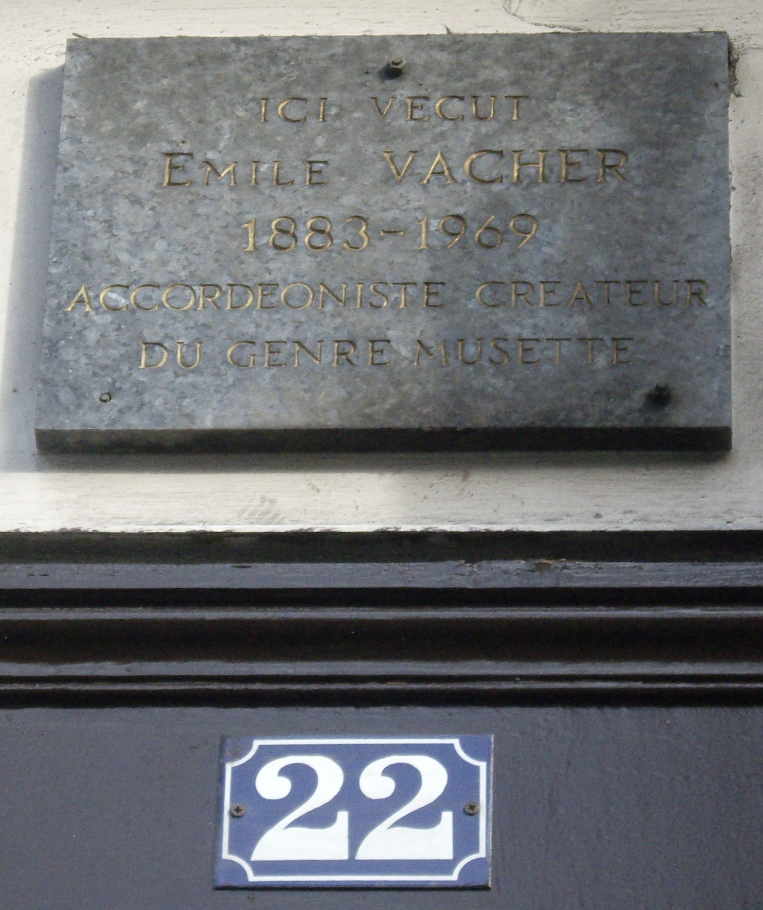 Plaque commémorative, 22 boulevard Saint-Denis, Paris 10e. « Ici vécut Émile Vacher, 1883-1969, accordéoniste créateur du genre musette. »